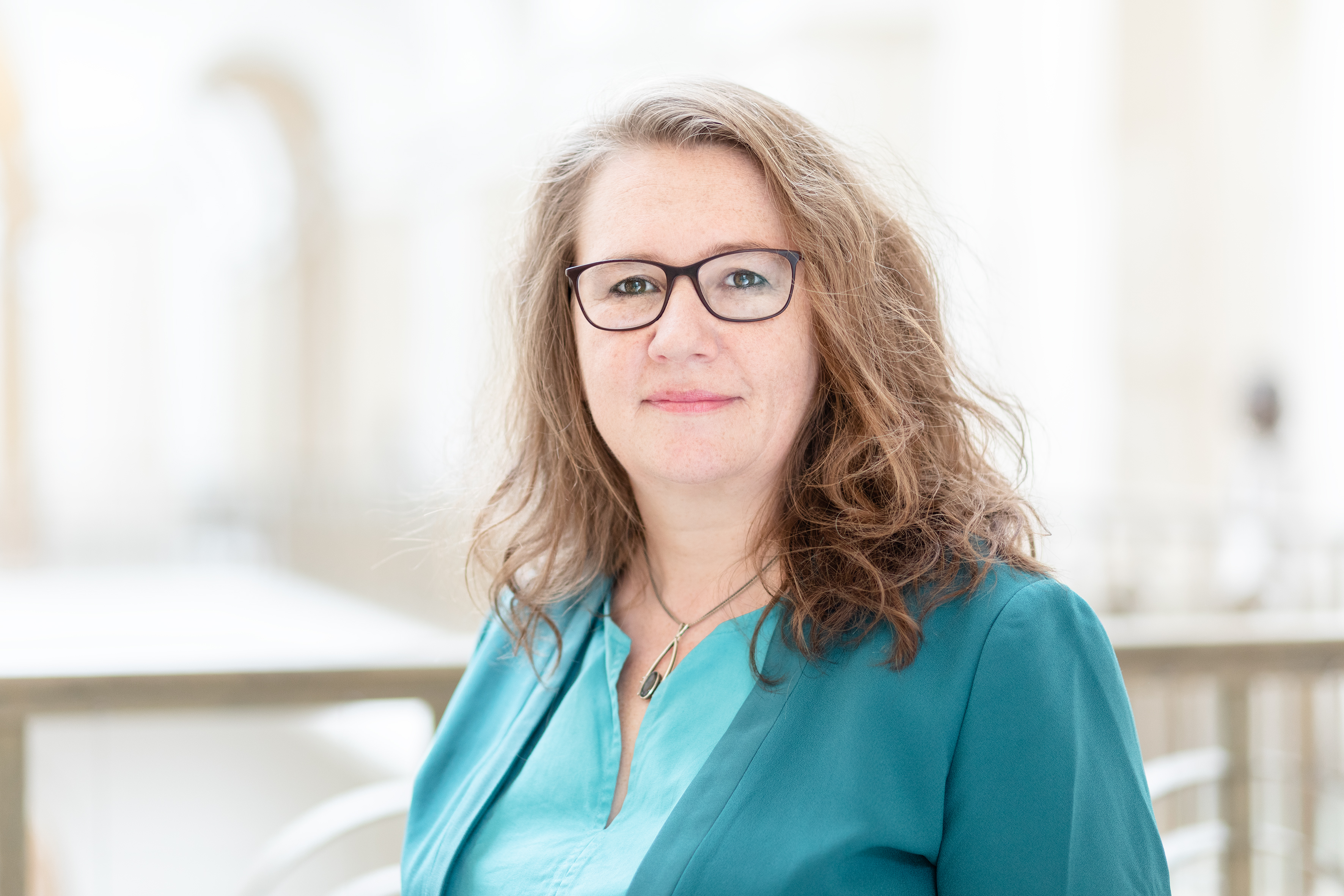 Daniela Billig, Abgeordnete der Grünen-Fraktion Berlin